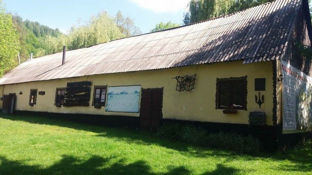 кузня